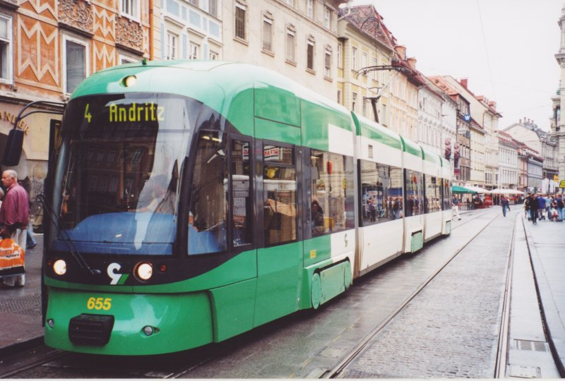 Cityrunner in Graz (etwas anderes Design)